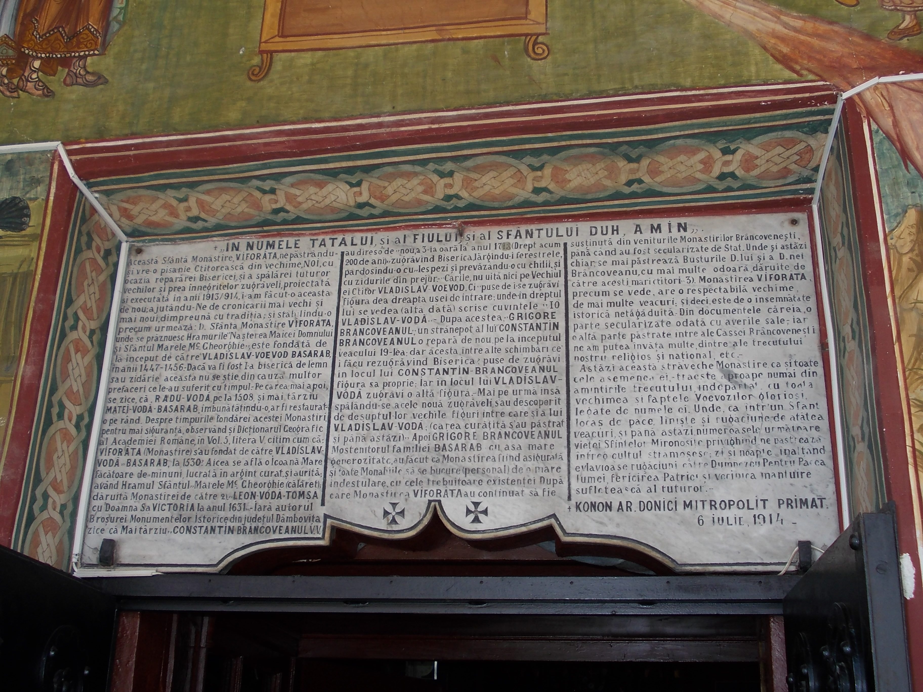 Biserica "Nașterea Maicii Domnului", "Sf. Gheorghe" 01